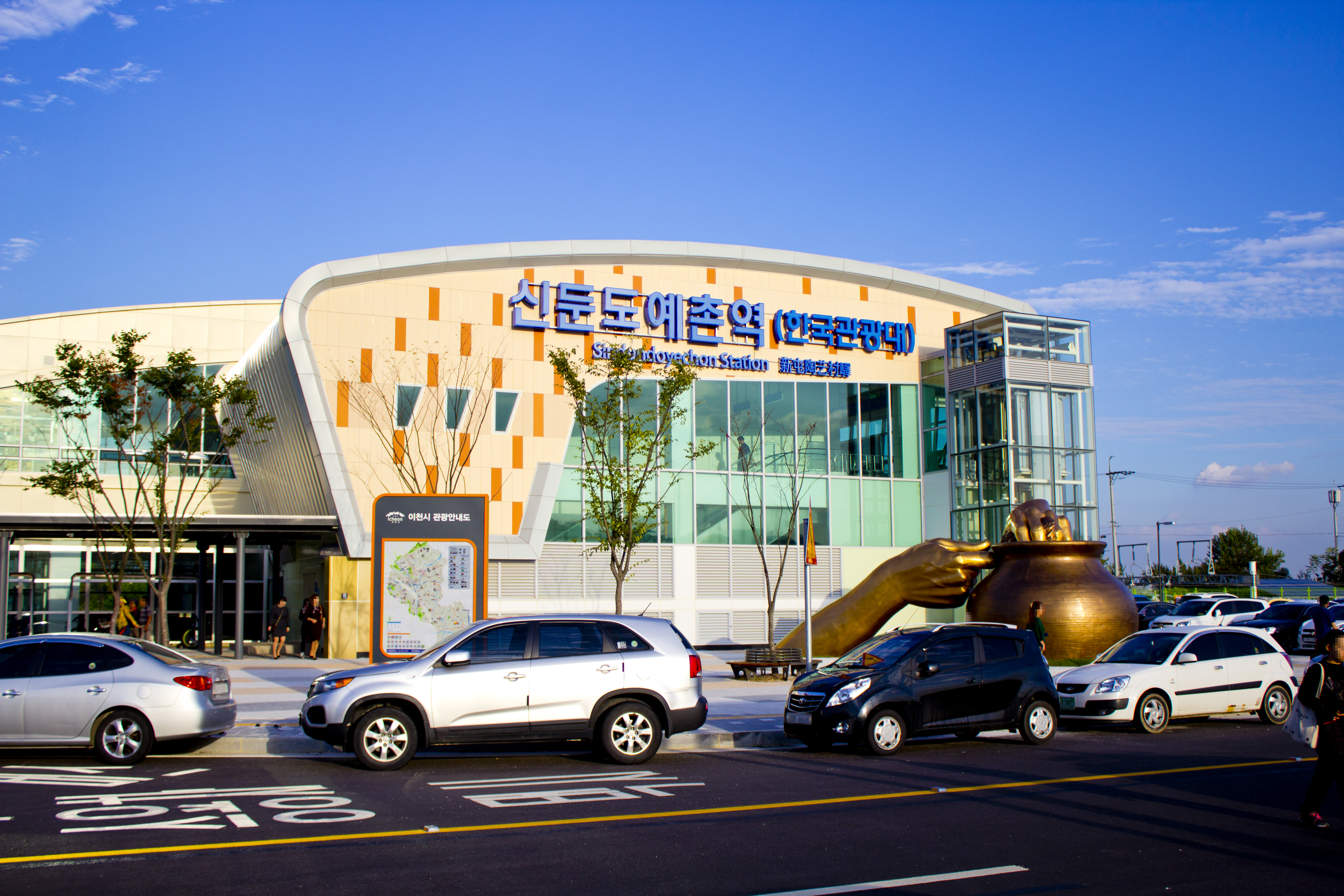 경강선 신둔도예촌역 역사 전경